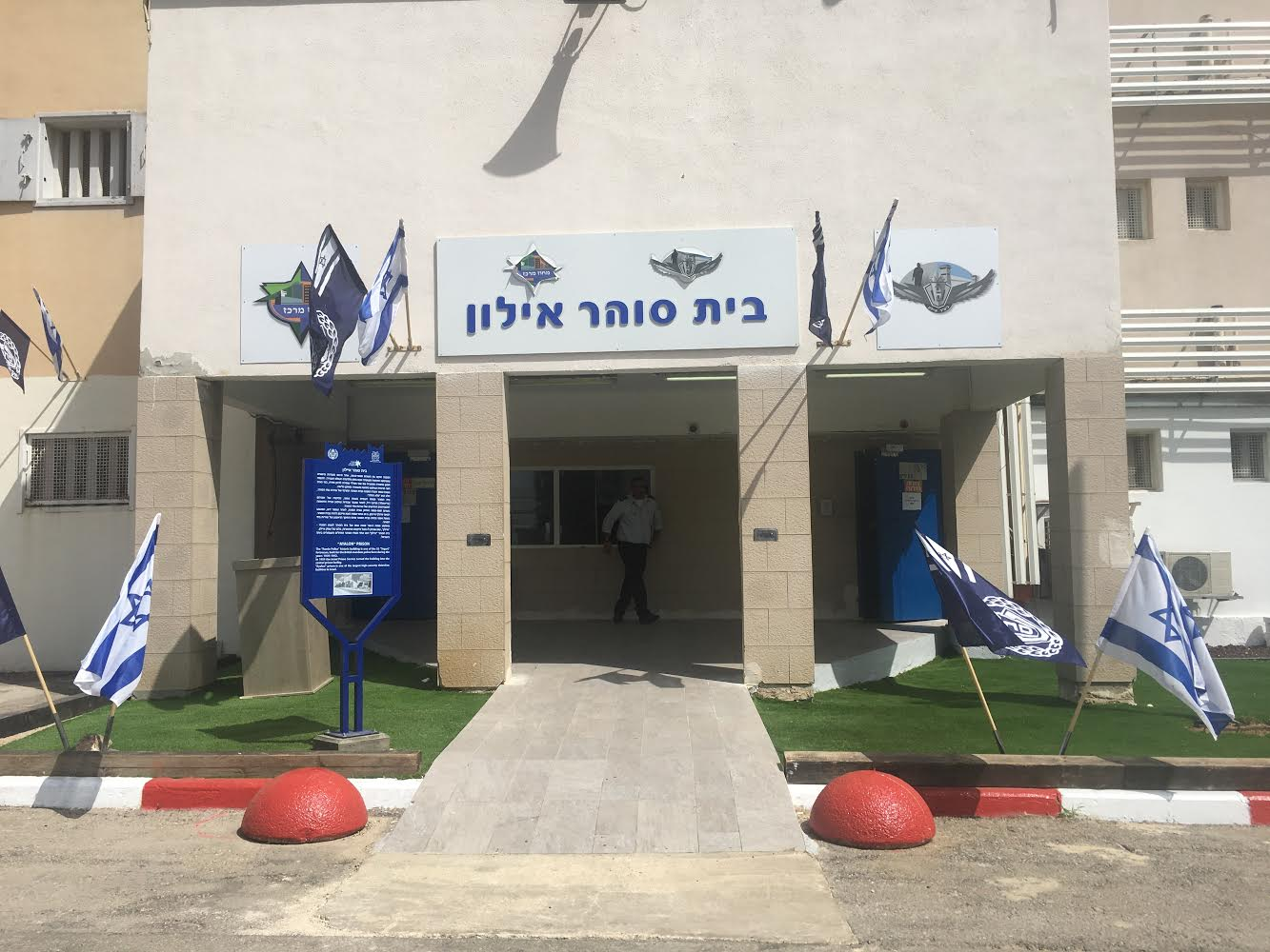 שער הכניסה לבית סוהר איילון. צולם בשנת 2018